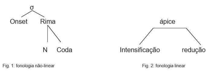 Comparação entre modelo não-linear e modelo linear